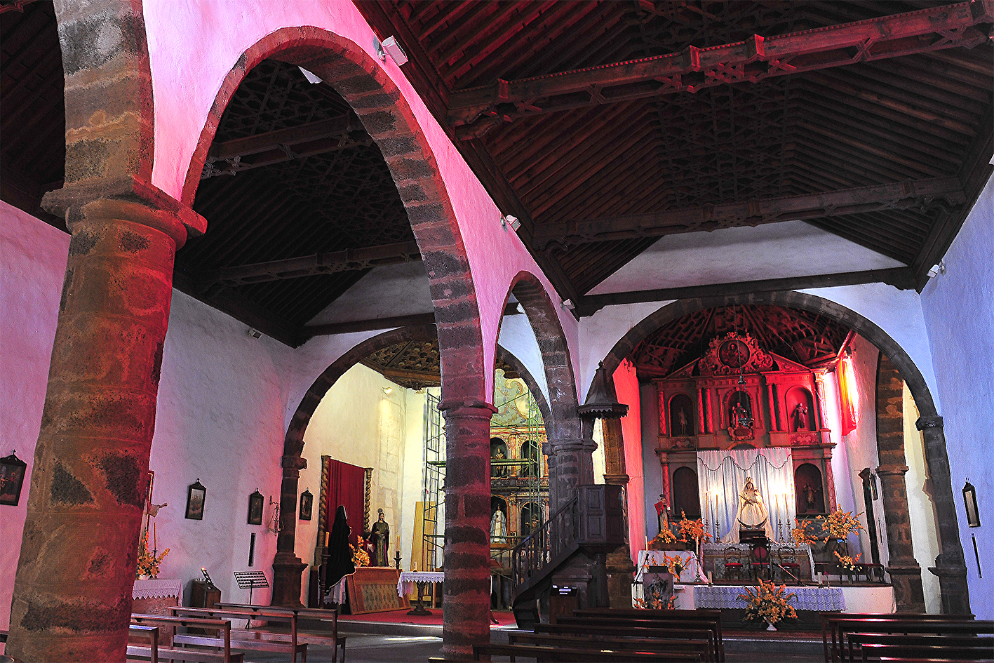 Interior de la Igliesia de Nuestra Señora de La Luz en Santo Domngo, Garafia